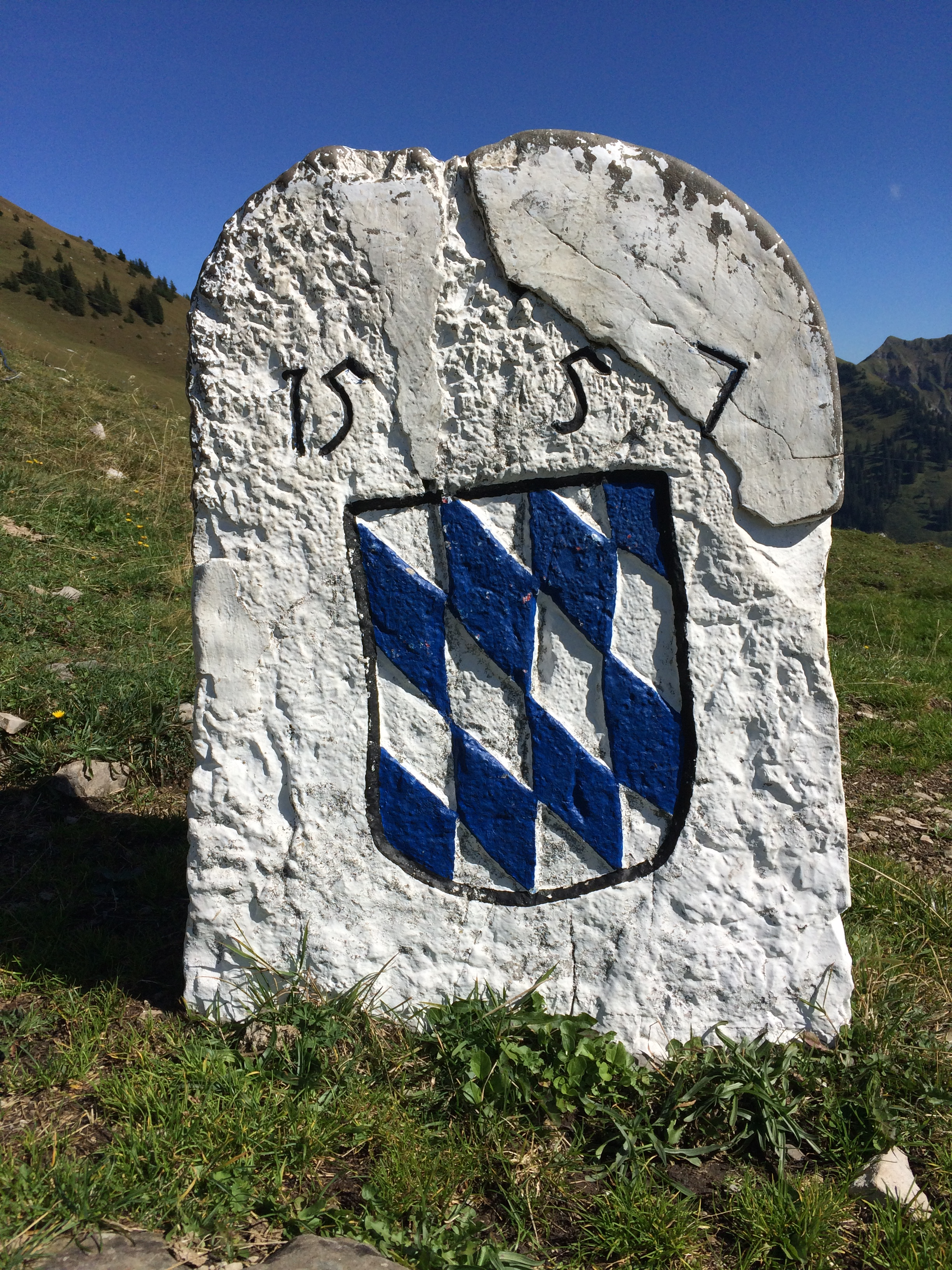 Grenzstein am Demmeljoch-Hochleger im Karwendel von 1557, hier bayerische Seite